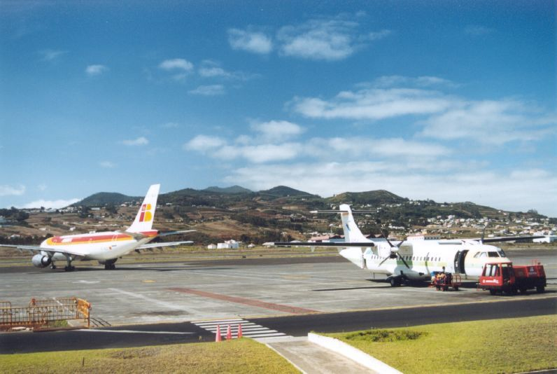 International Airport Los Rodeos Tenerife Norte, Canary Islandsaeropuerto2